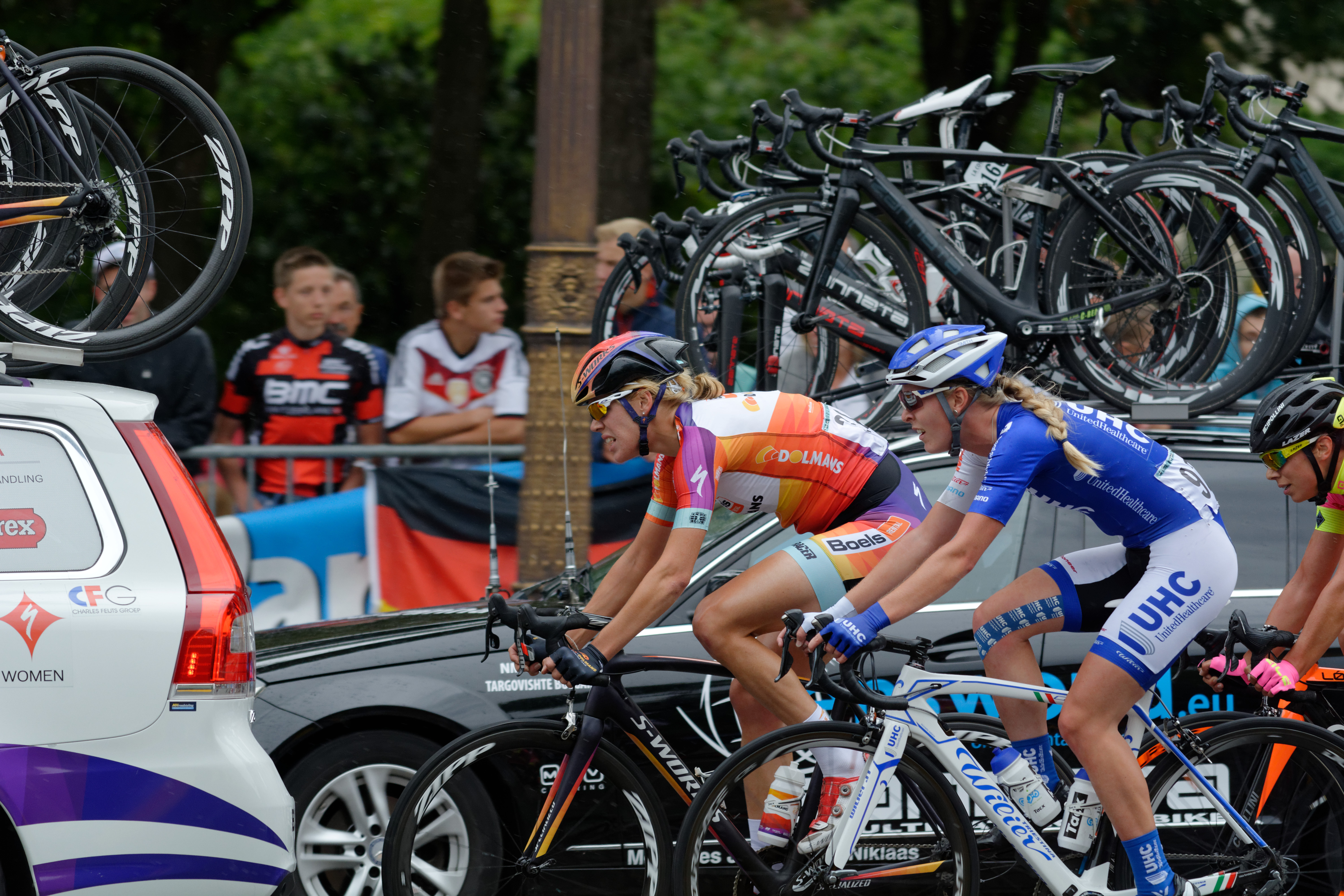 D71_1687_DxO